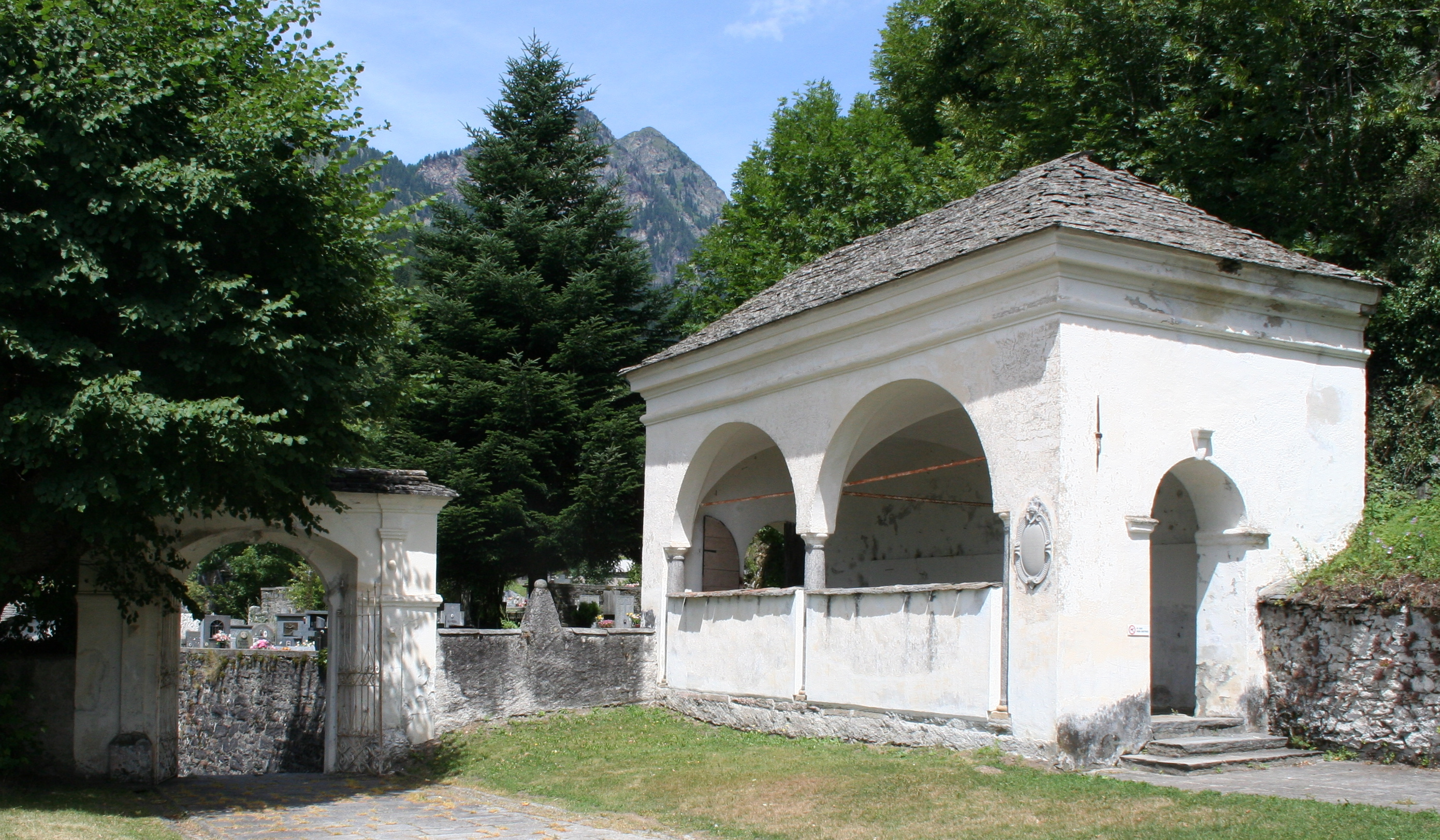 Kirche Sta. Maria Assunta Calanca: Beinhaus